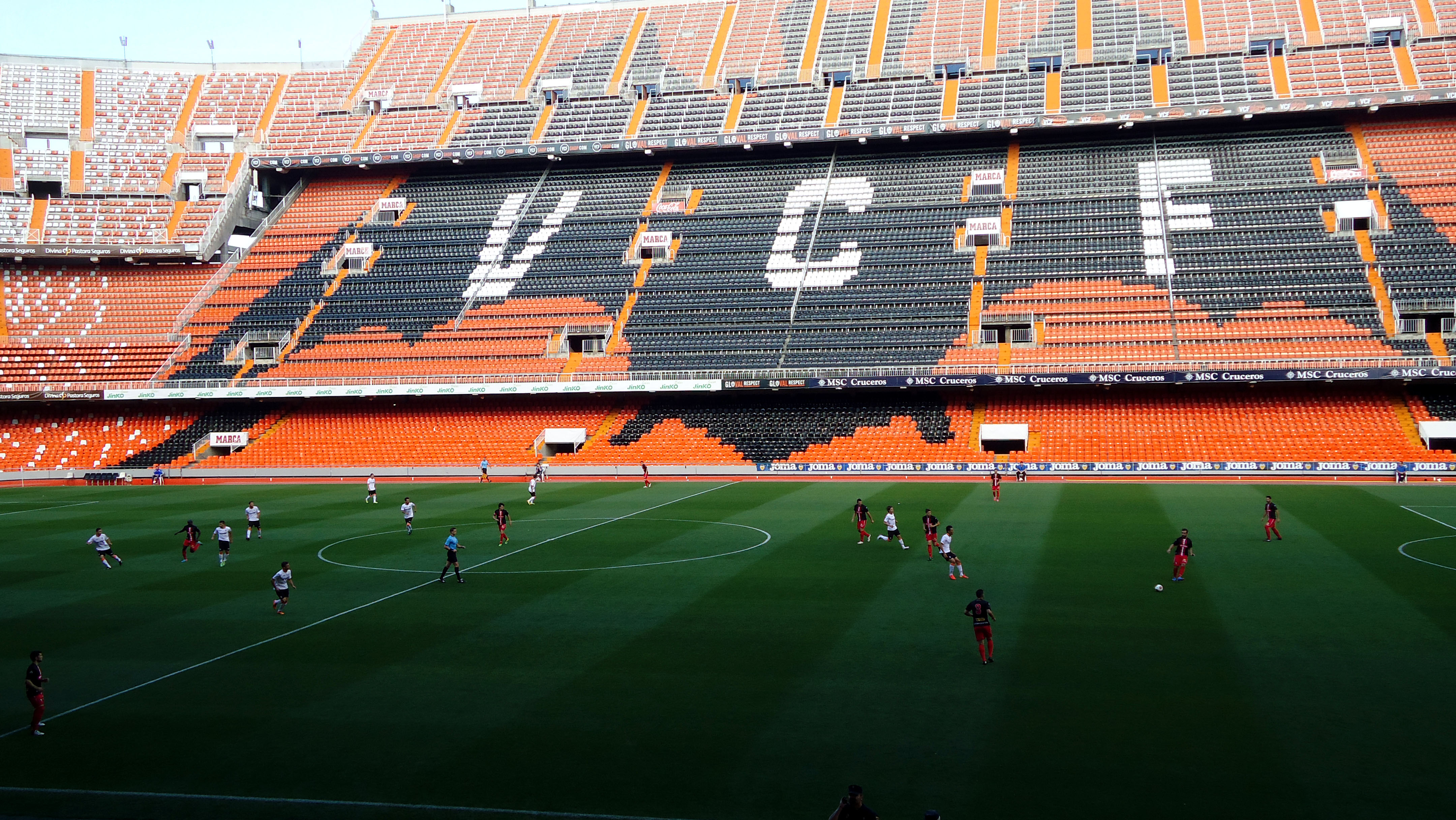 Imagen del encuentro por la permanencia en Segunda División B disputado en el estadio de Mestalla de Valencia entre el Valencia Mestalla y el Algeciras Club de Fútbol en 25 de mayo de 2014.